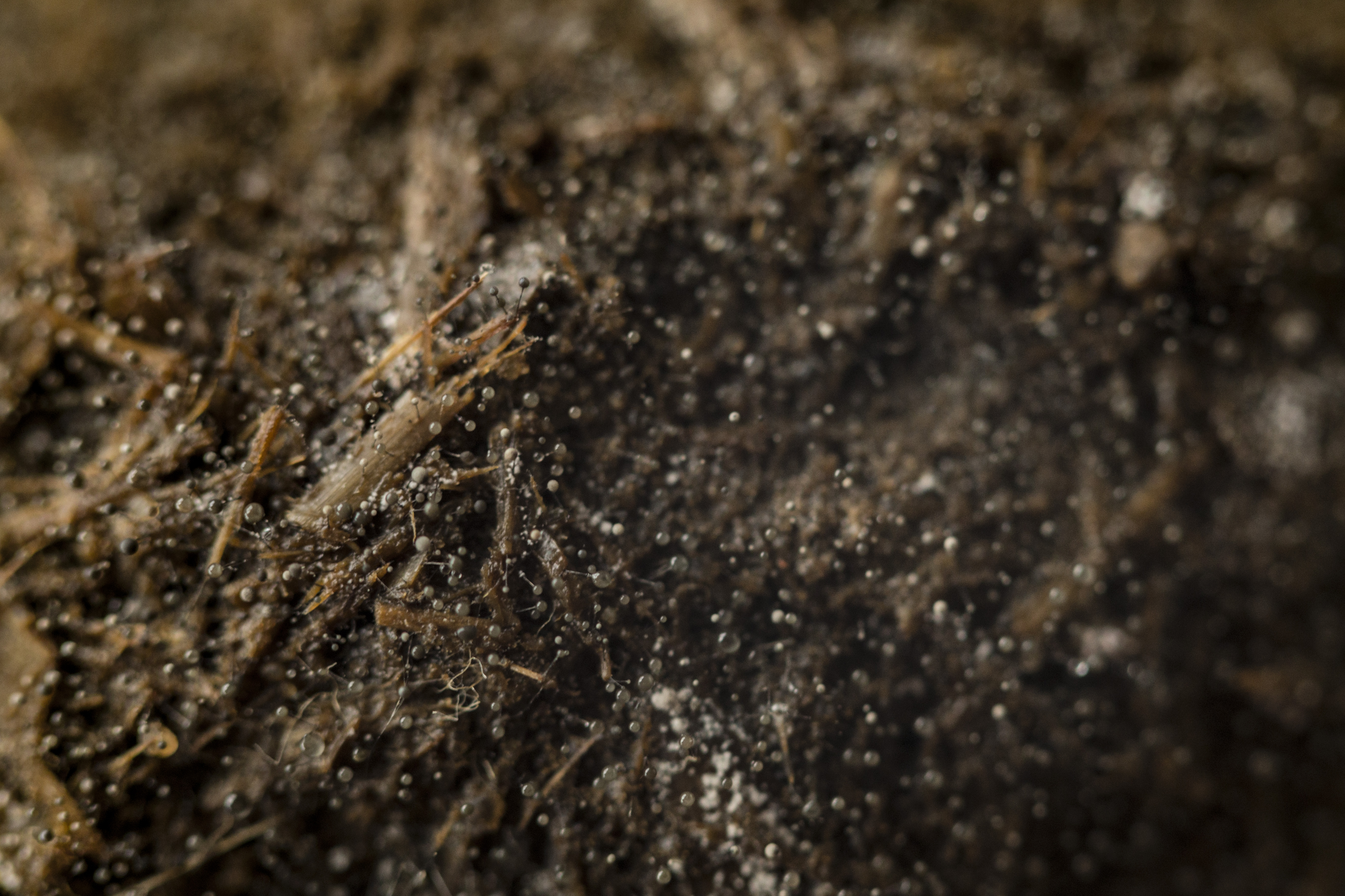 Koprofagi na wystawie w Centrum Nauki Kopernik